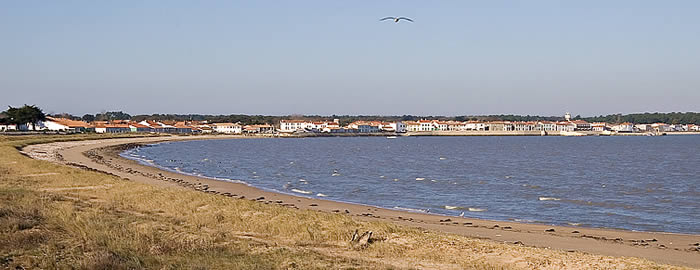 La baie de Rivedoux-Plage - île de Ré, côte nord - France Photo issue de ma banque d'images. Alain Pep.per 27 aoÃ»t 2006 Ã 11:19 (CEST)